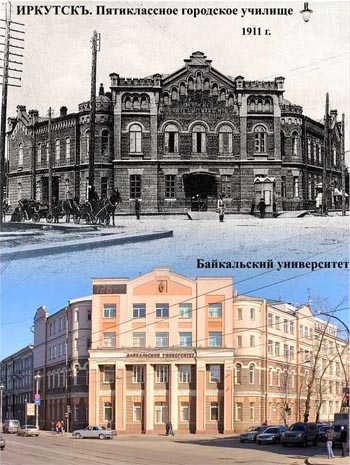 Городское пятиклассное училище (ныне Байкальский государственный университет экономики и права)